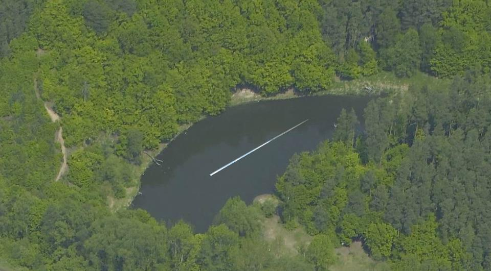 zrcadlo plovoucí na hladině, 40m x 10 cm, 2012, Lelekovice, Brno